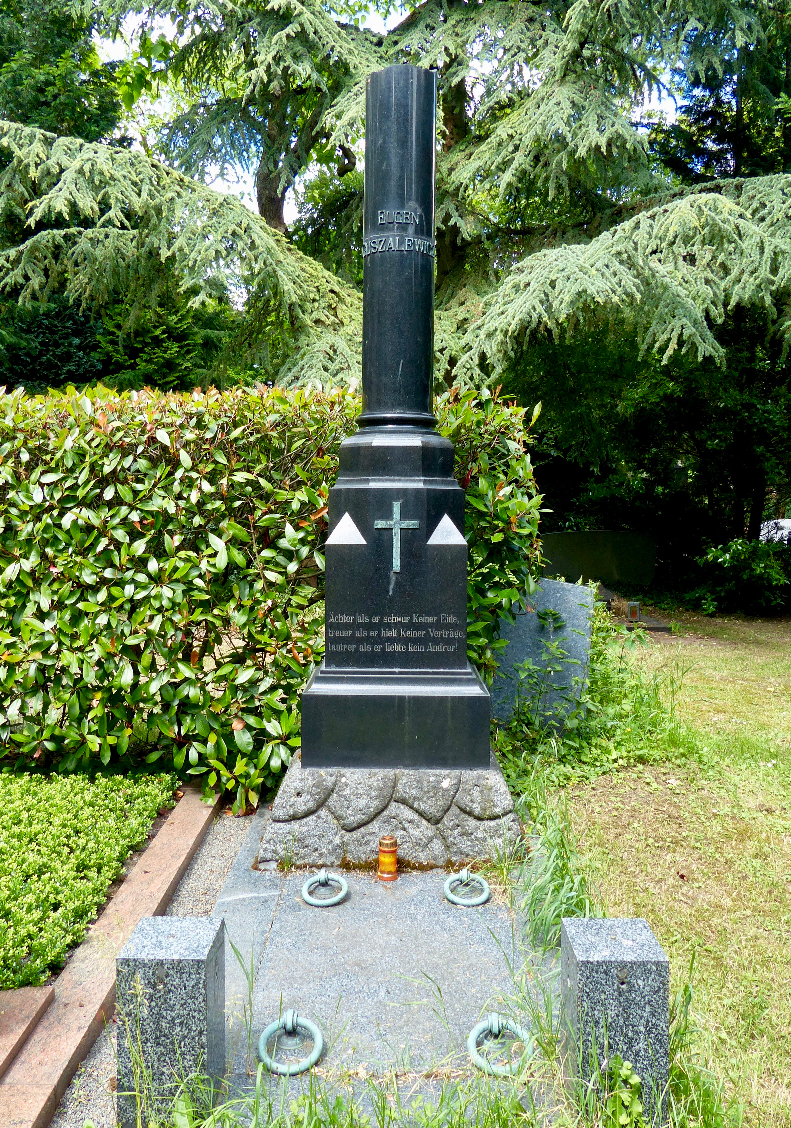 Familiengrab Eugen, Alice, Genia Guszalewicz und Paulina Olga Guszalewicz-Kuckelkorn; Flur 52